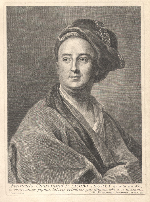 Jacques Thuret, horloger du roi